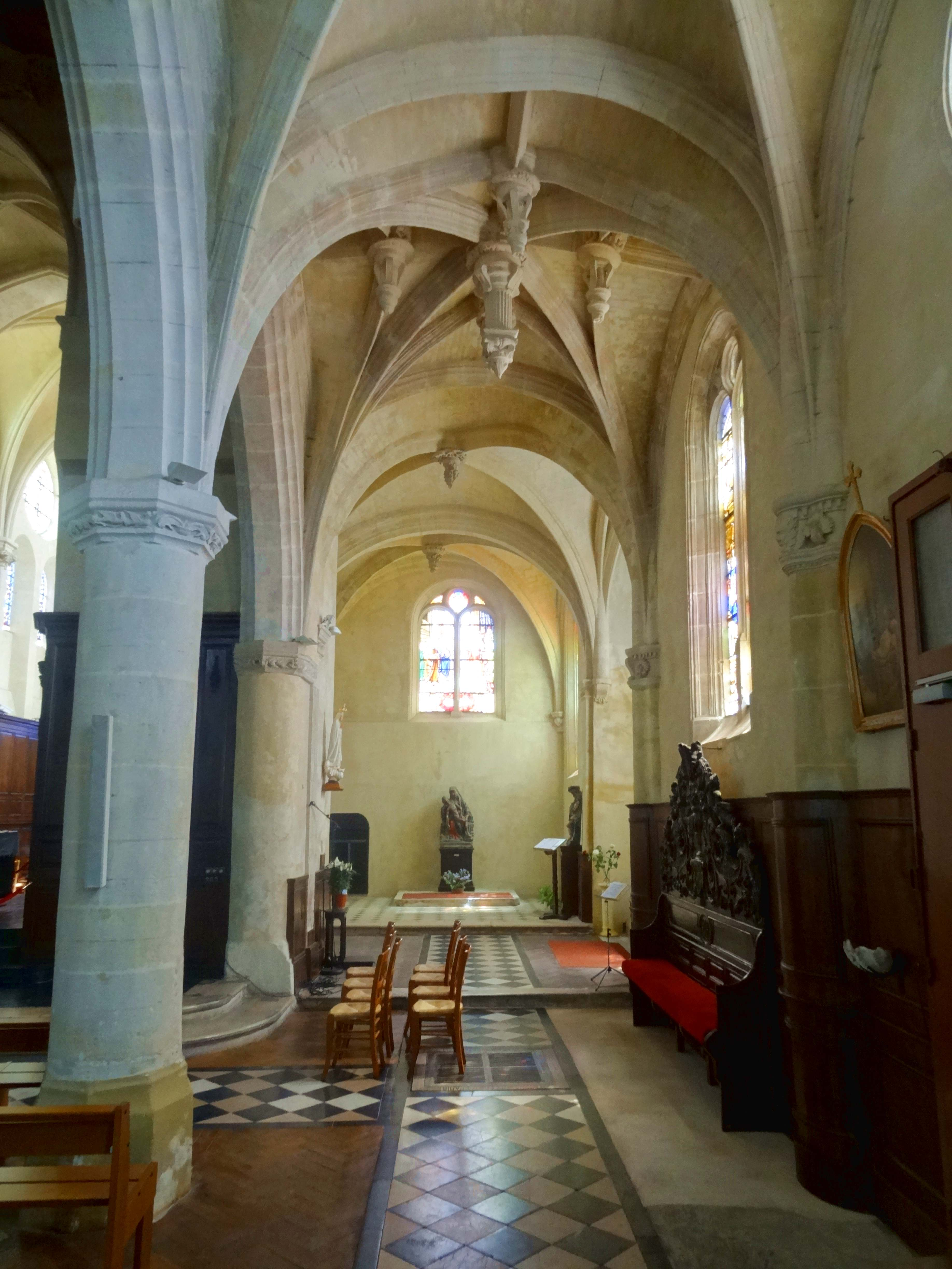 Intérieur de l'église - voir titre.